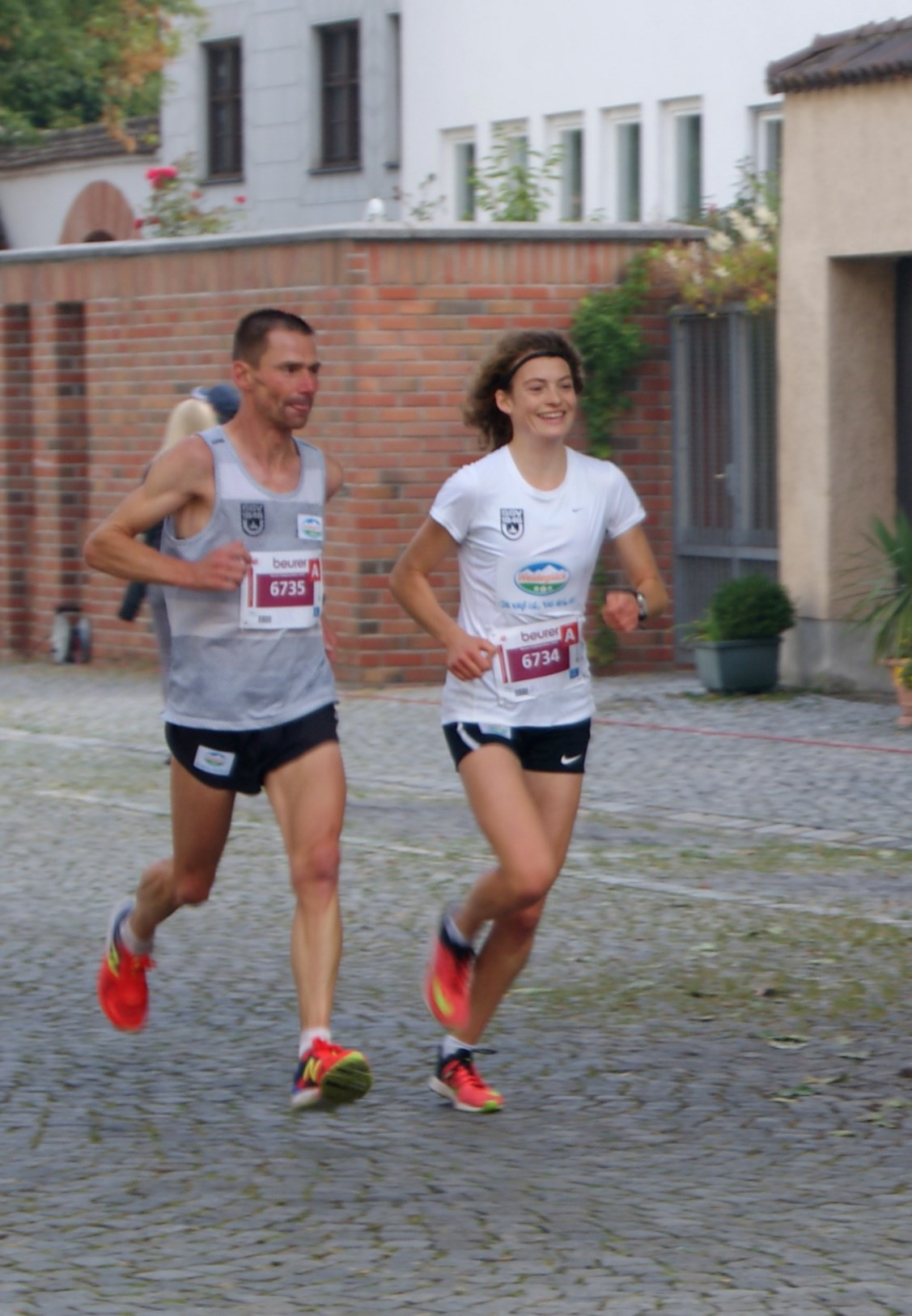 Alina Reh, Halbmarathon beim Einstein-Lauf Ulm, 25.9.2016